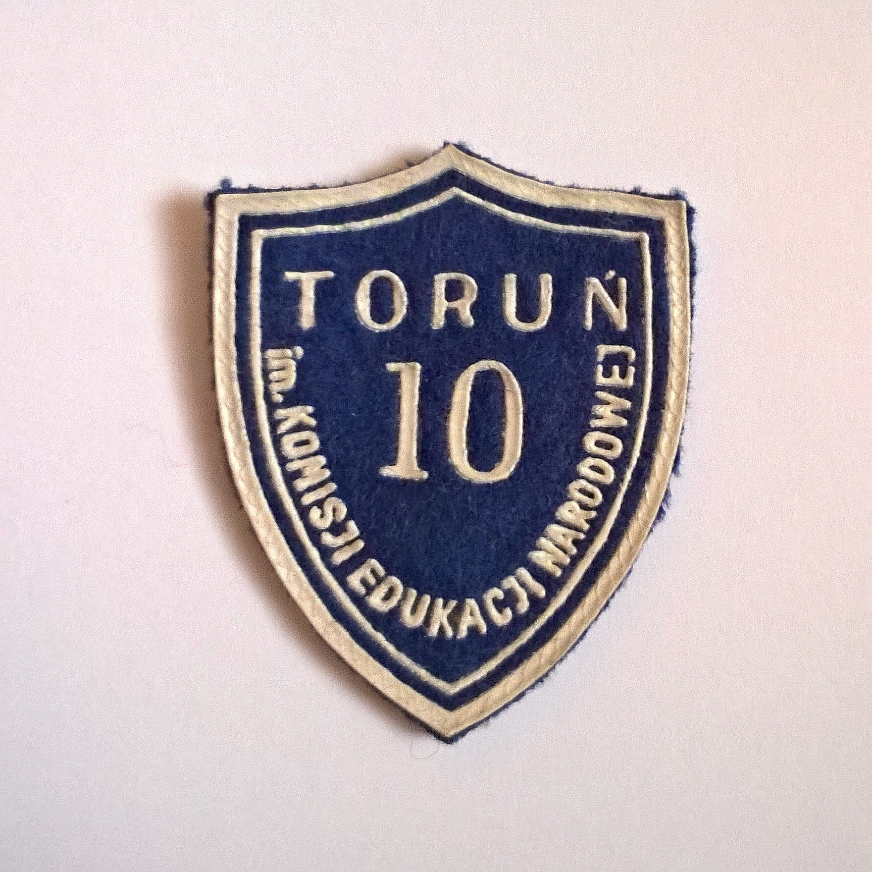 Tarcza szkolna Szkoły Podstawowej nr 10 w Toruniu (1970 rok)